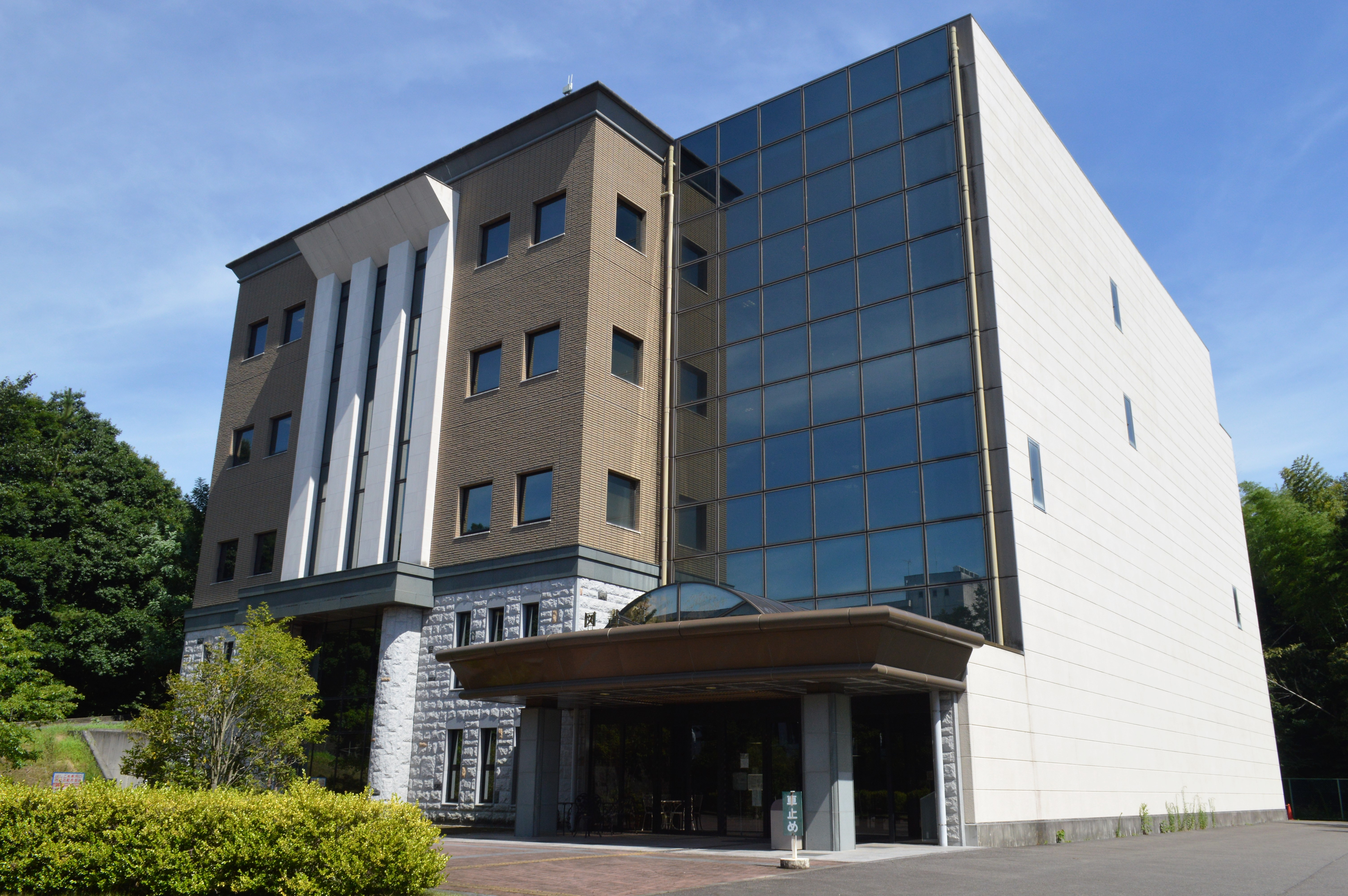 愛知県犬山市の名古屋経済大学犬山キャンパスにある名古屋経済大学図書館。